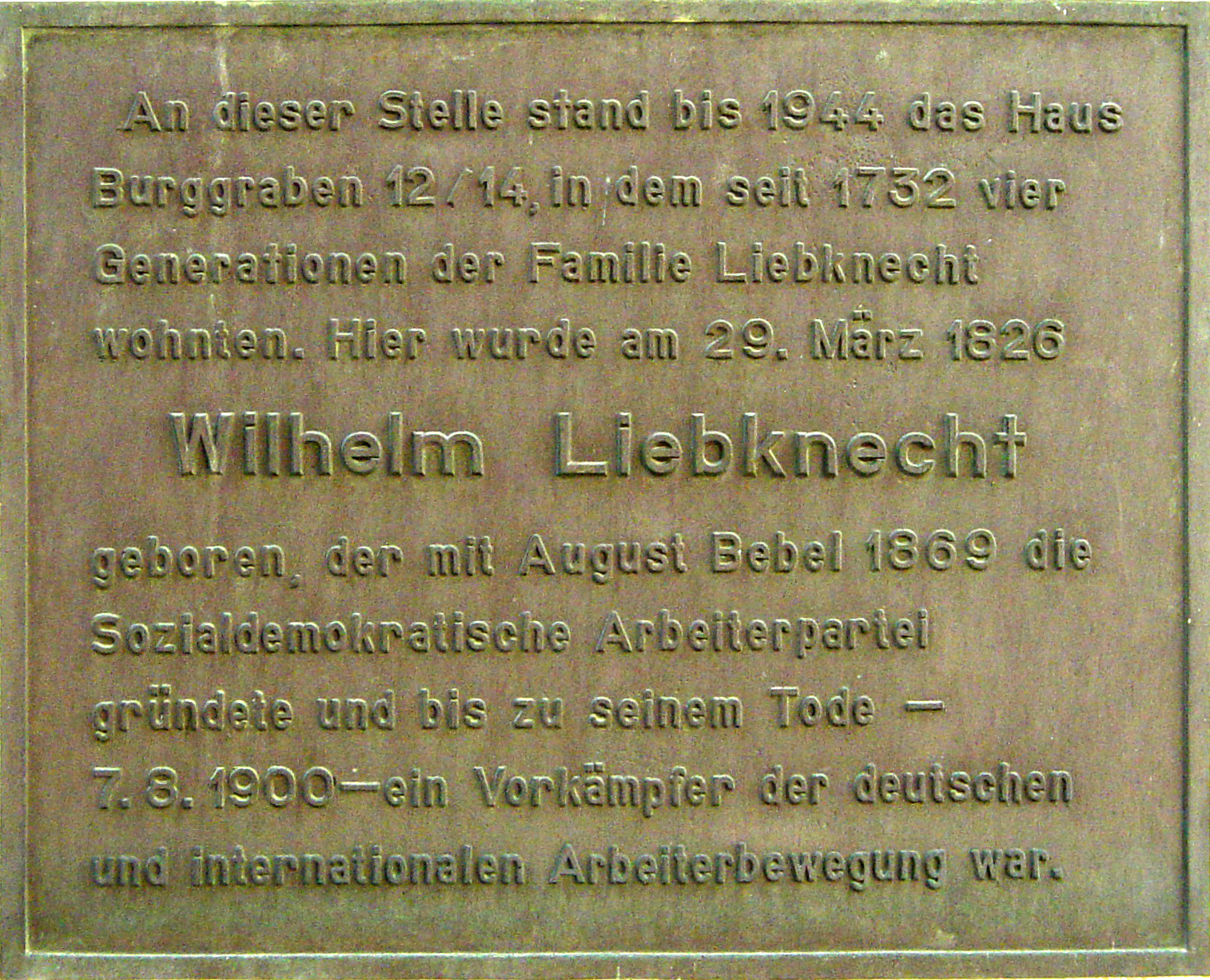 "An dieser Stelle stand bis 1944 das Haus Burggraben 12/14, indem seit 1732 vier Generationen der Familie Liebknecht wohnten. Hier wurde am 29. März 1826 Wilhelm Liebknecht geboren, der mit August Bebel 1869 die Sozialdemokratische Arbeiterpartei gründete und bis zu seinem Tode - 7.8.1900 - ein Vorkämpfer der deutschen und internationalen Arbeiterbewegung war."